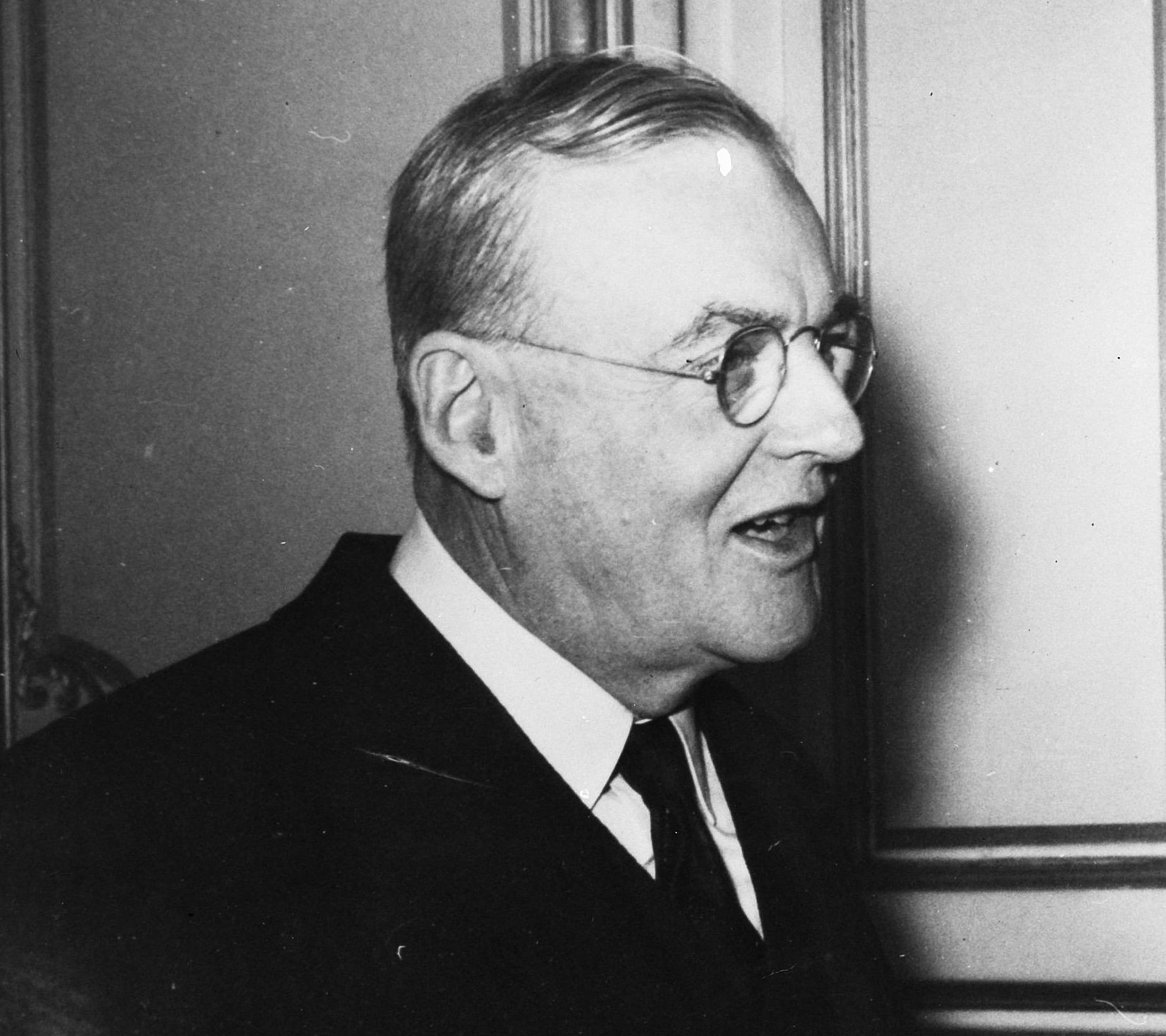 Collectie / Archief : Fotocollectie Anefo Reportage / Serie : [ onbekend ] Beschrijving : Portret van John Foster Dulles Datum : 27 oktober 1948 Trefwoorden : Portreten Persoonsnaam : Dulles, John Foster Fotograaf : Fotograaf Onbekend / Anefo, [onbekend] Auteursrechthebbende : Nationaal Archief Materiaalsoort : Glasnegatief Nummer archiefinventaris : bekijk toegang 2.24.01.09 Bestanddeelnummer : 903-0759